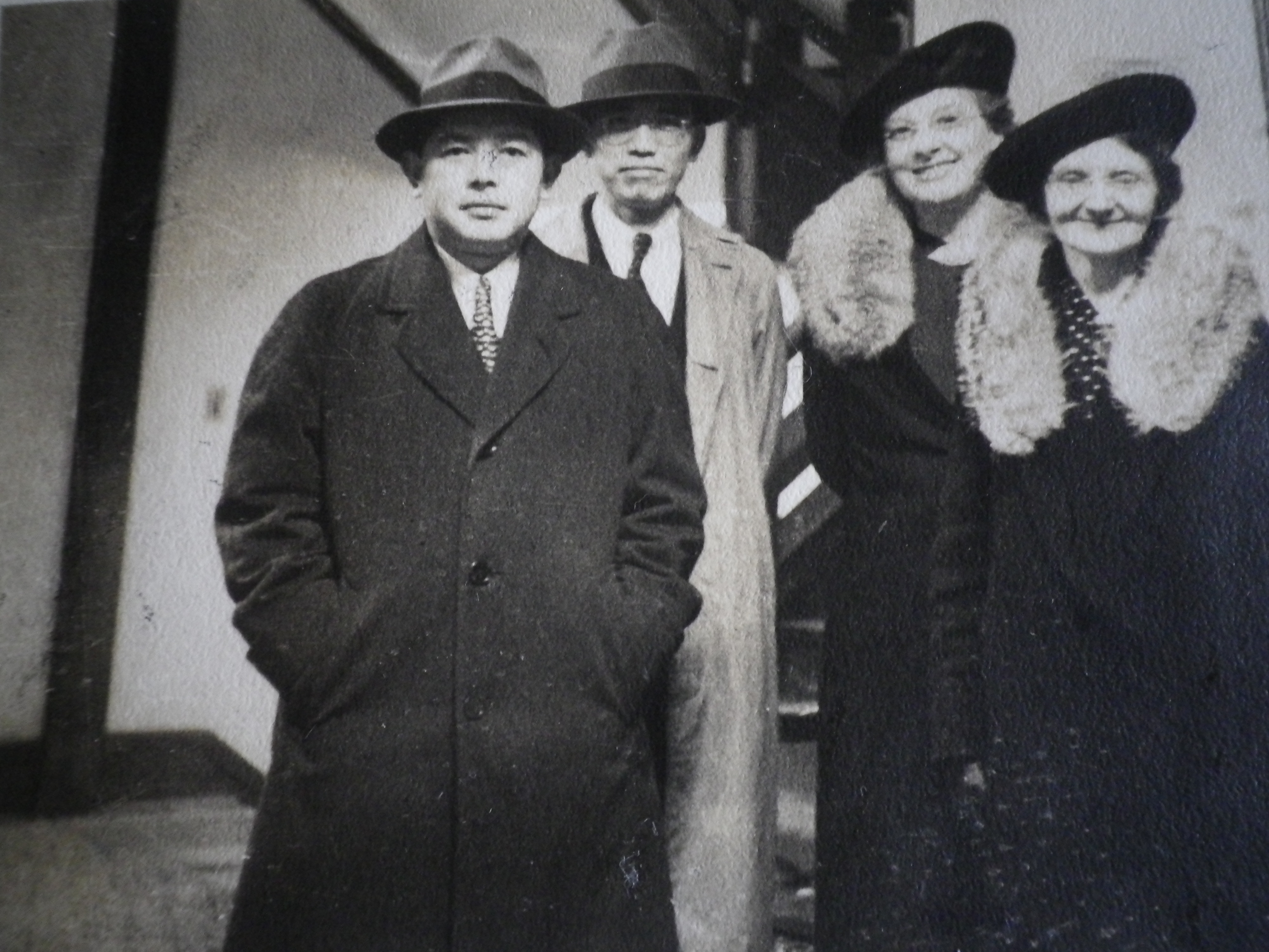 ハツラー女史とニューヨークで再開、1938~1939年